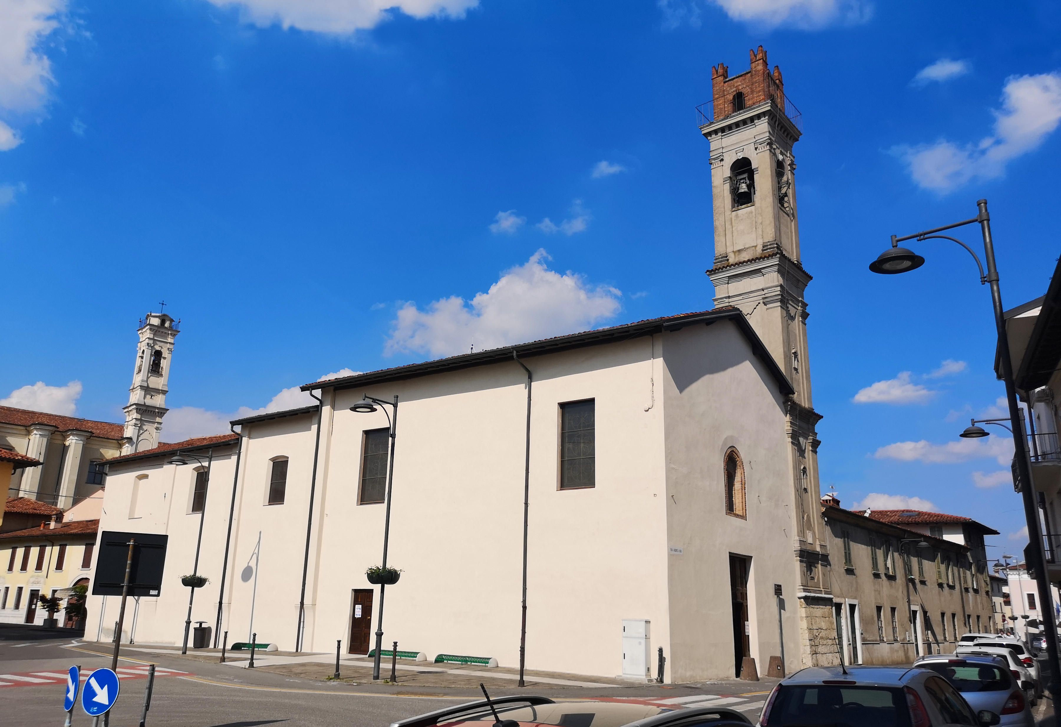 Chiesa di Lourdes, Travagliato